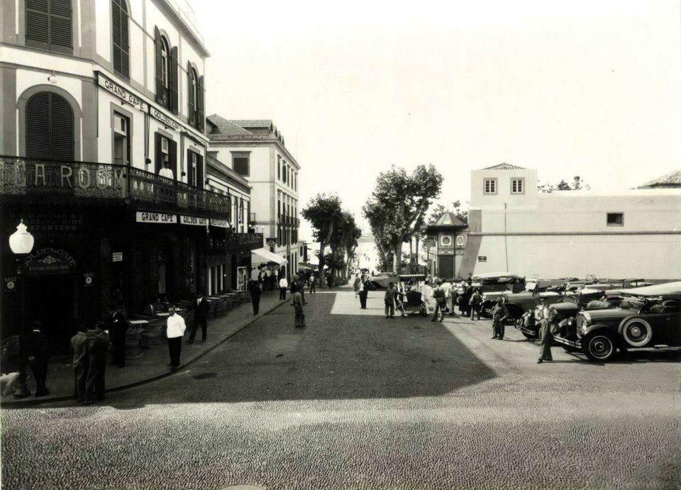 Hotel Golden Gate e praça de táxis do Largo da Restauração. Antigo Largo da Constituição e futura Avenida Zarco, então Entrada da Cidade. Fotografia de 1935 (c.). Funchal, ilha da Madeira